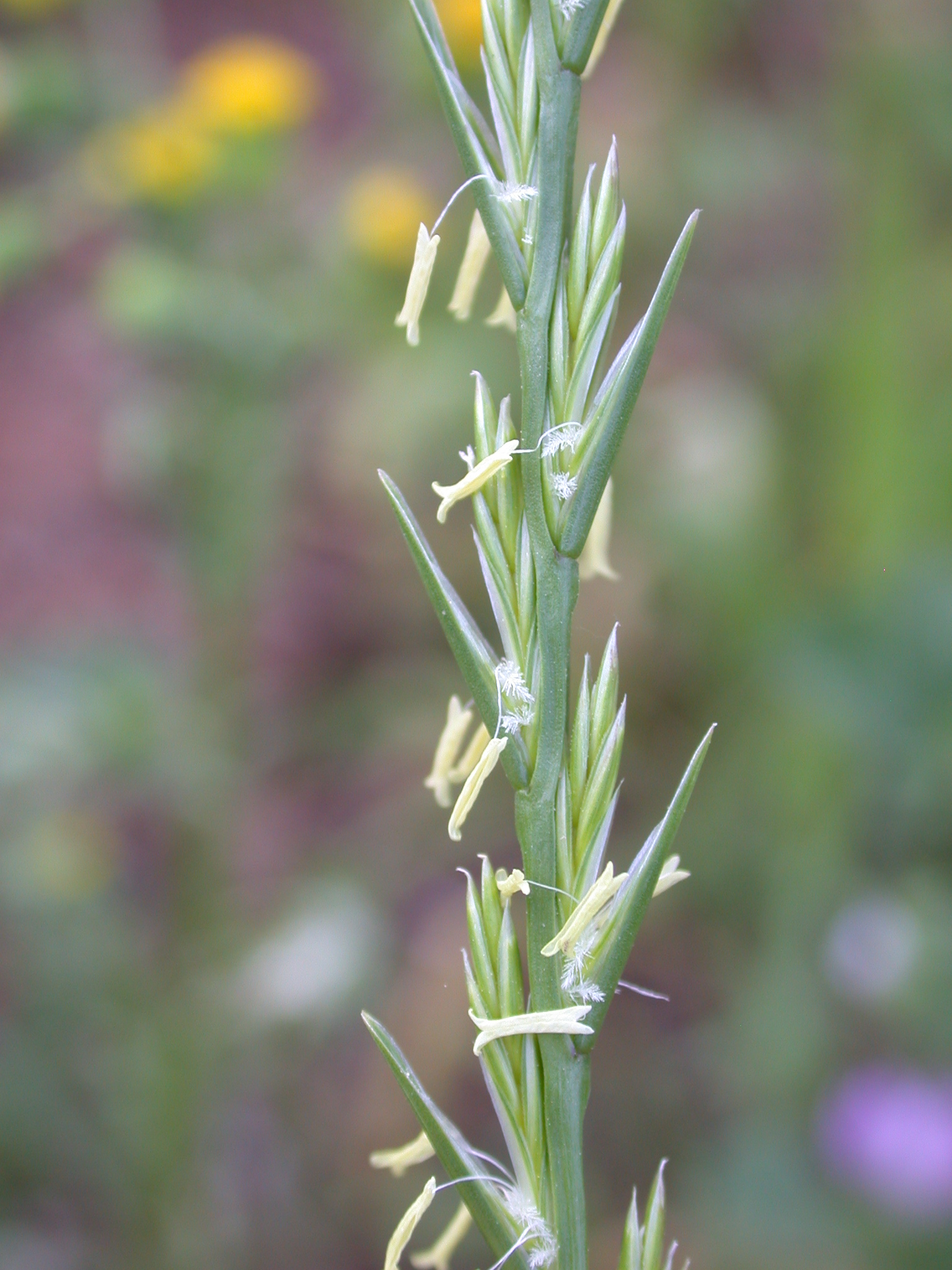 Lolium rigidum Gaudin (זון אשון), Haifa, Israel, March 7, 2008.